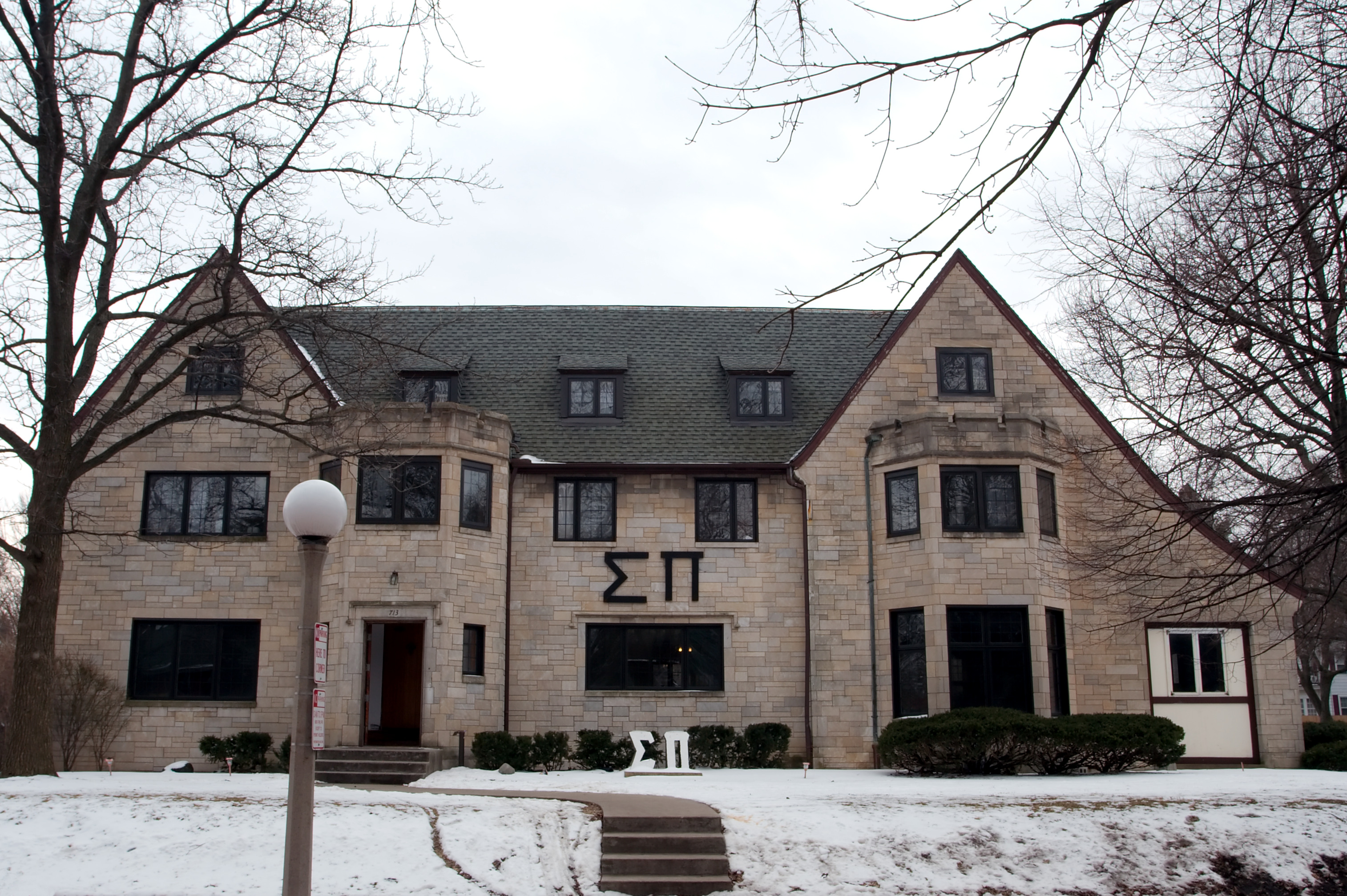 Sigma Pi house, Urbana, IL